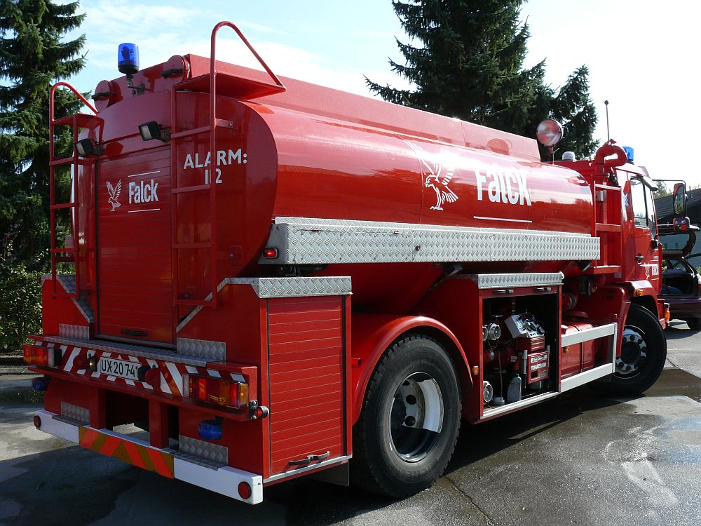 En vandtankvogn fra Falck.